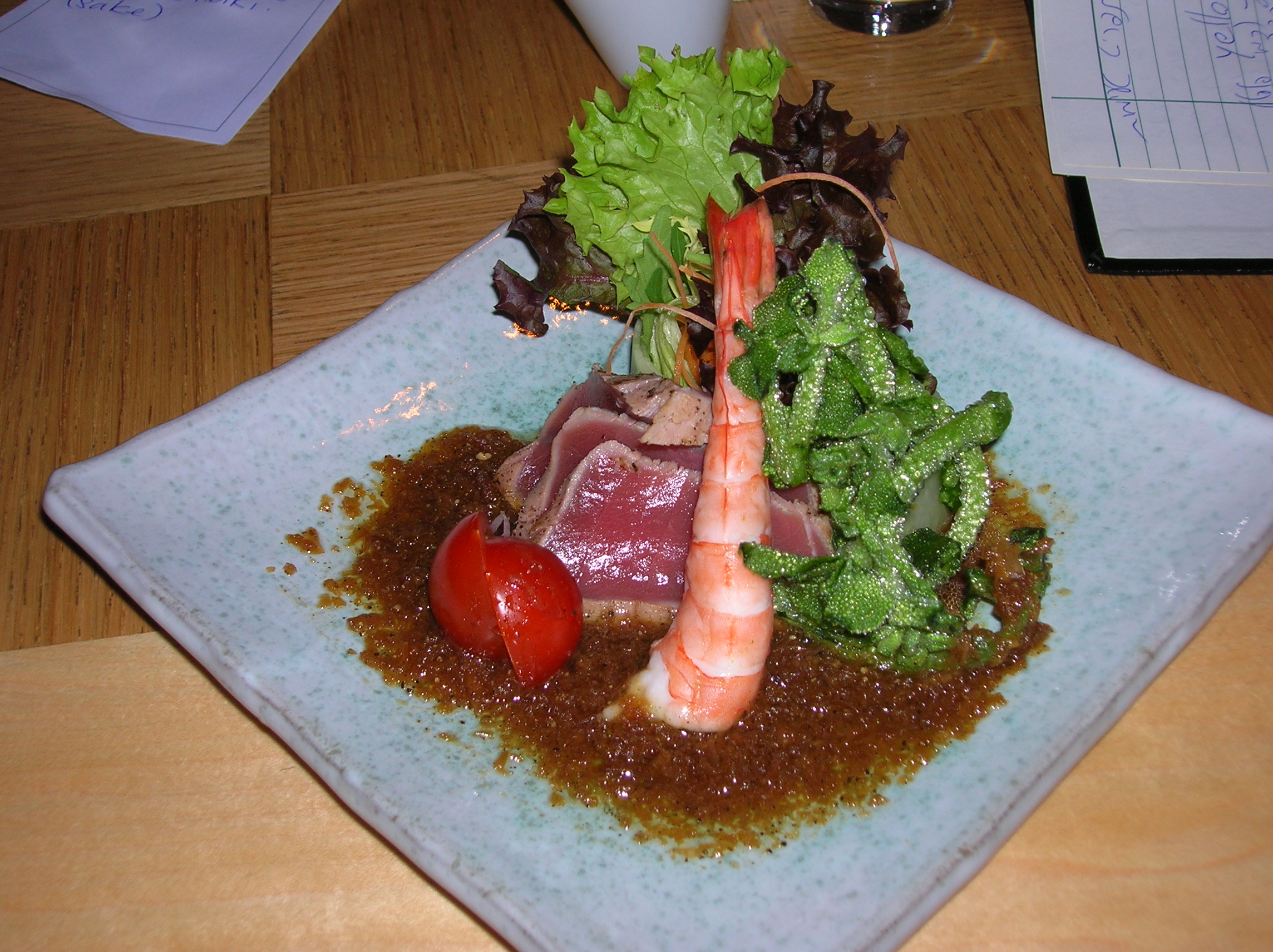 סלט טונה סשימי עם רוטב מסושיבה